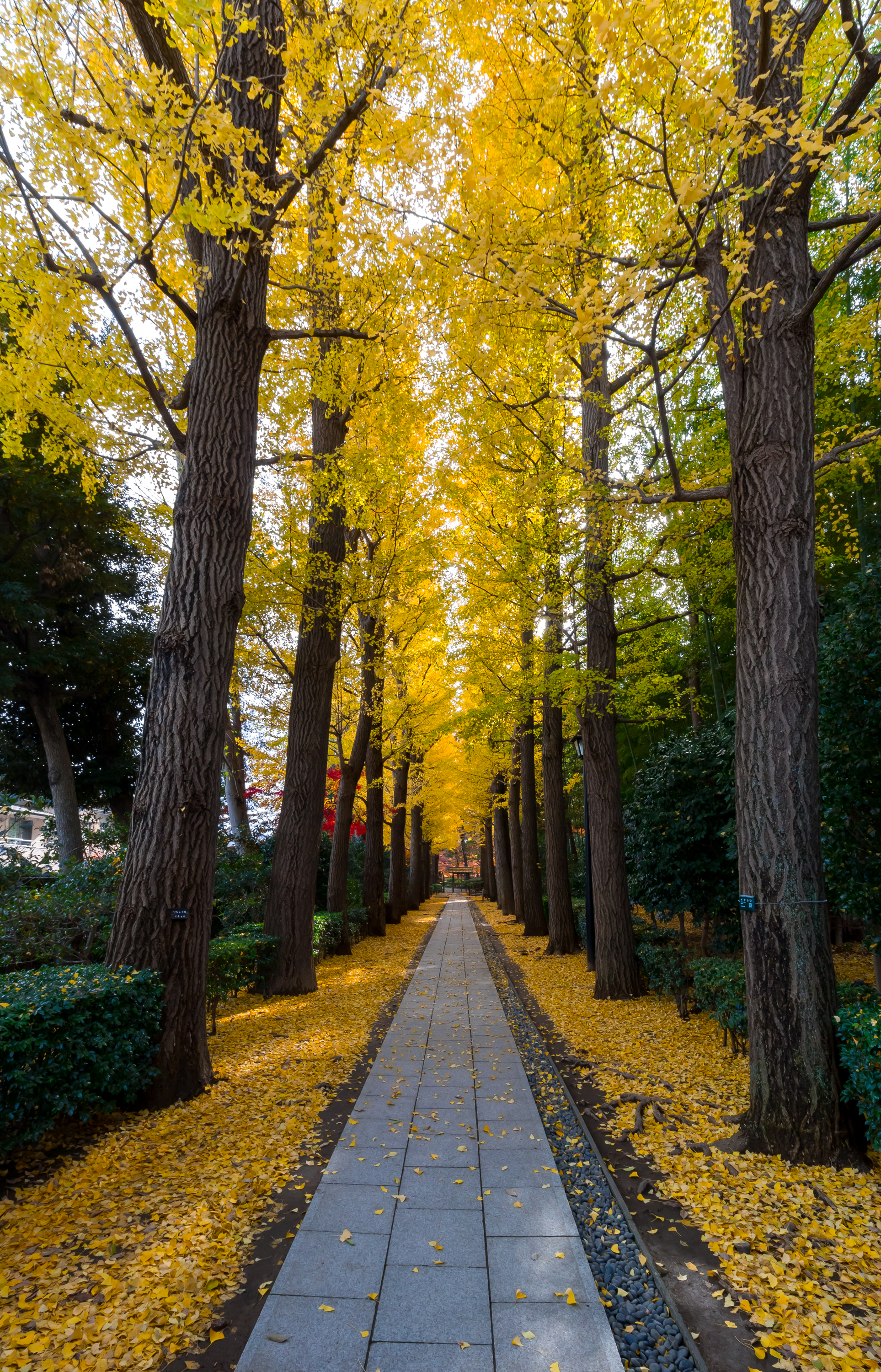 大田黒公園（東京都杉並区）